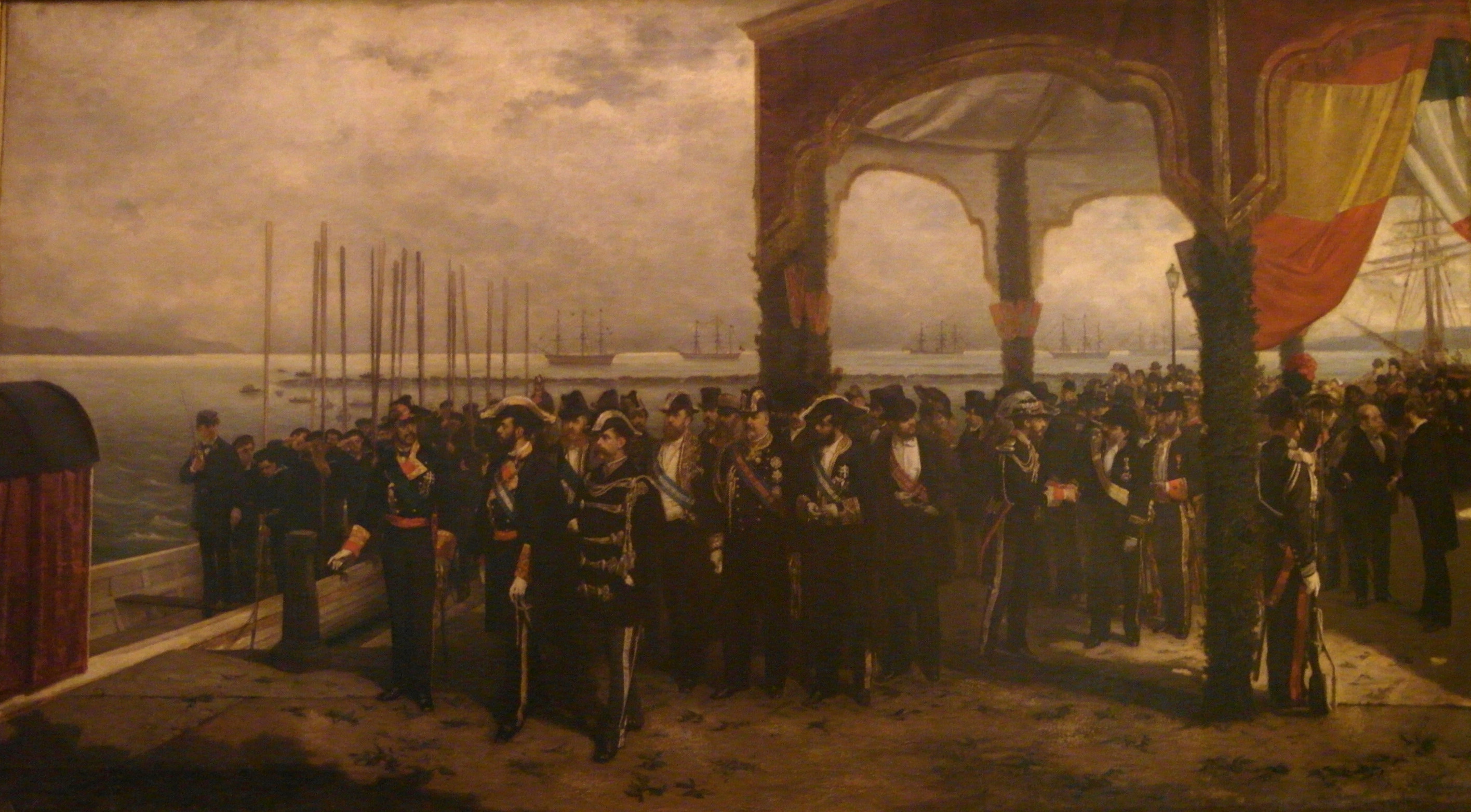 El lienzo representa el momento en que Amadeo I embarcó en el puerto de La Spezia para trasladarse a España y tomar posesión del trono español.